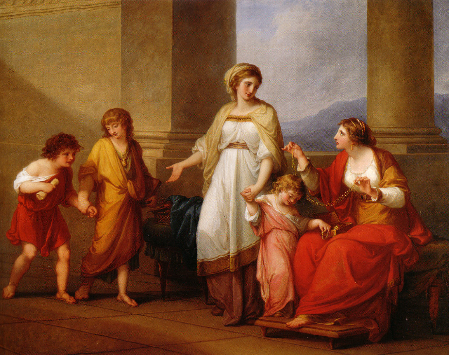 Cornelia, Mutter der Gracchen (Öl auf Leinwand, 101x127 cm)